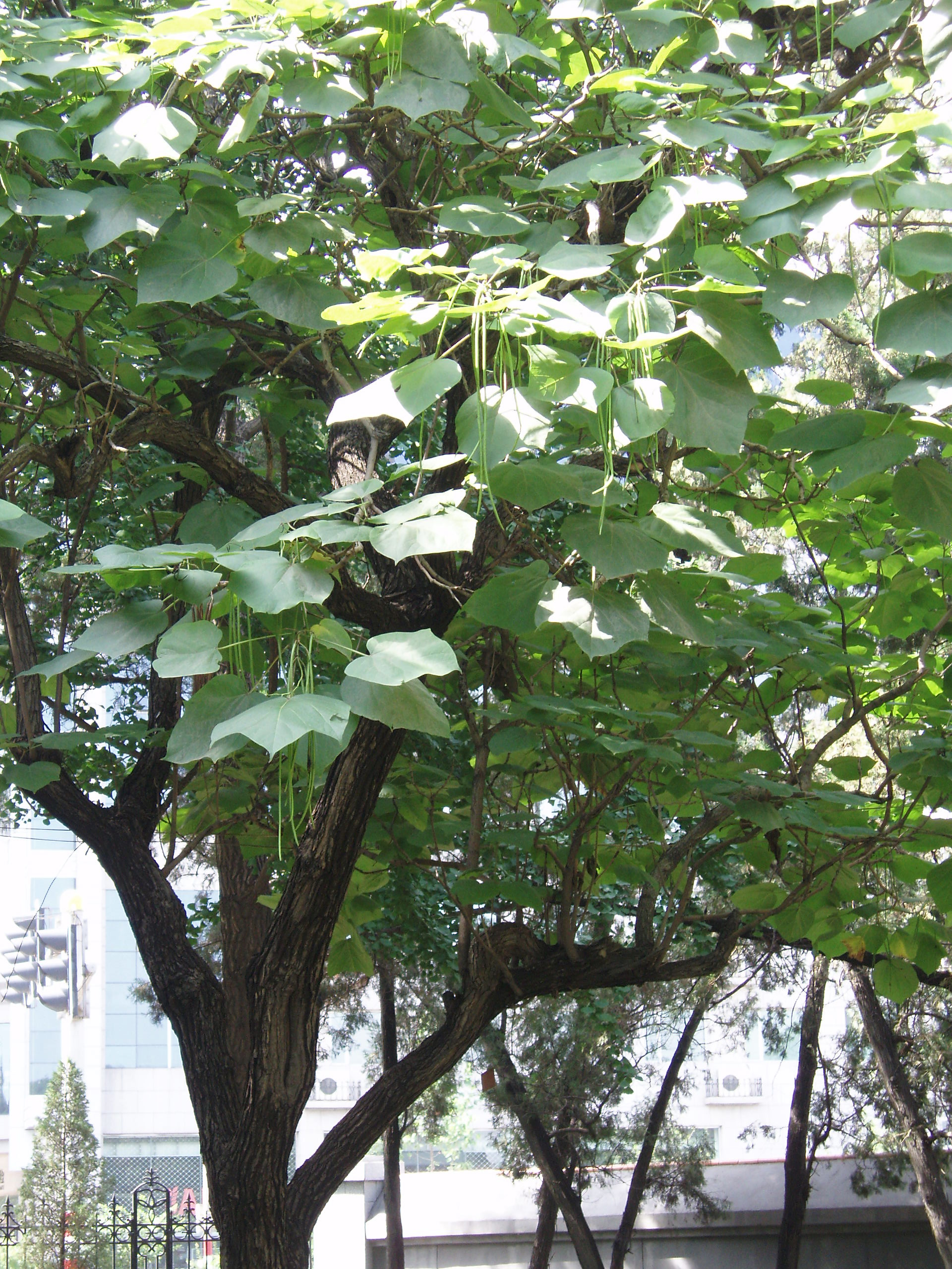 Chinese catalpa trees